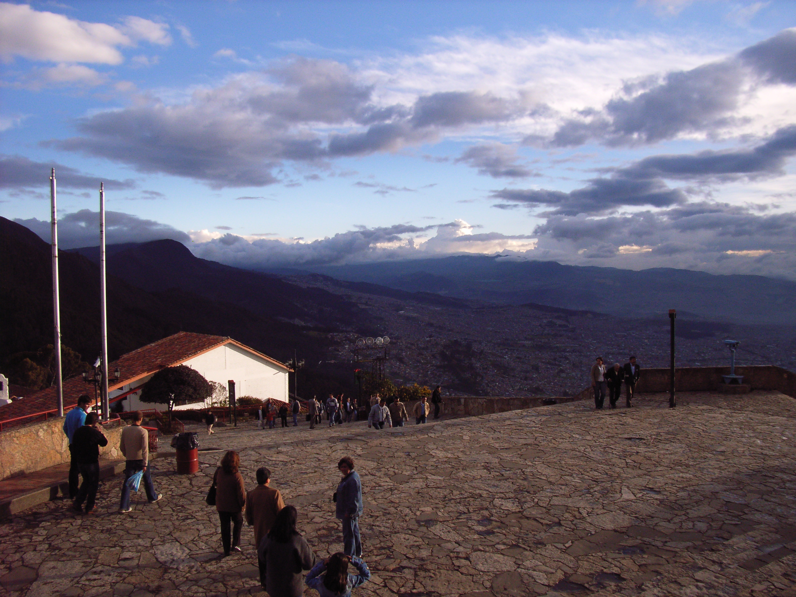 Monserrate, Bogotá ColOmbia